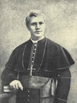 Giuseppe Sarto vescovo di Mantova, futuro patriarca di Venezia e papa Pio X.